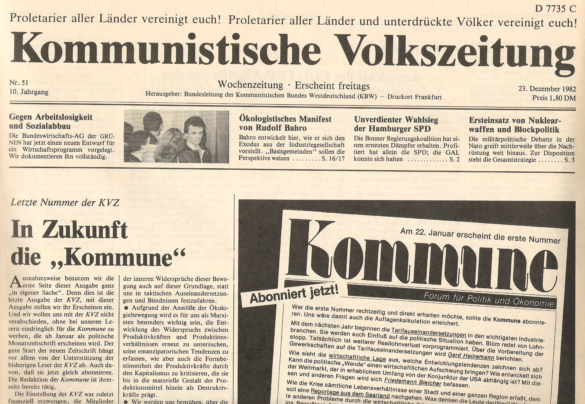 KVZ Nr. 51 1982, selbst eingescannt